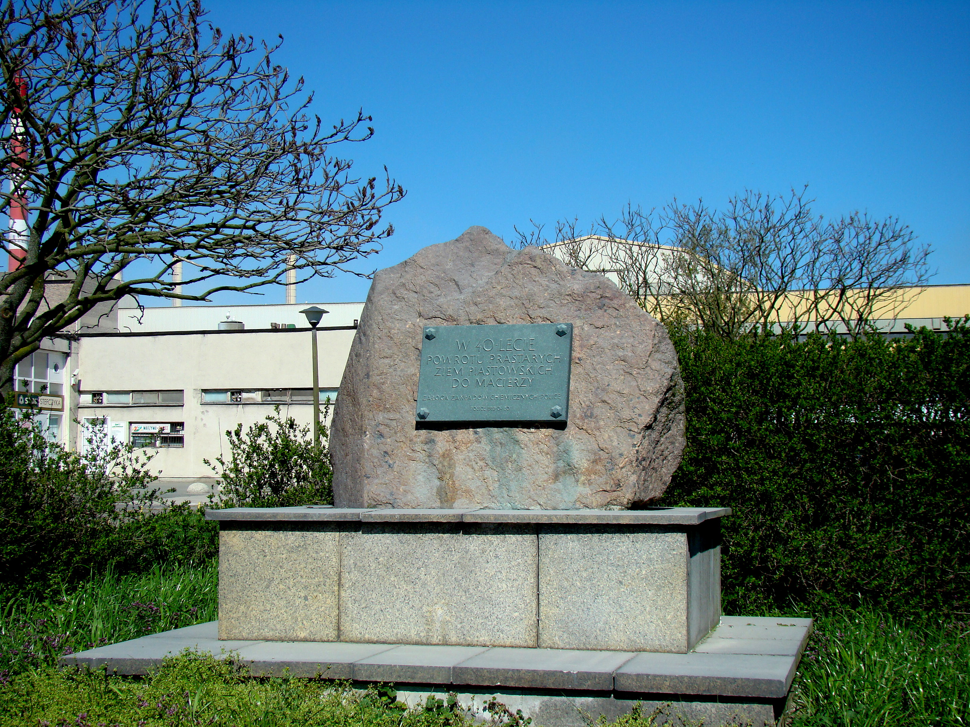 Zakłady Chemiczne Police, pamiątkowy głaz, (Police, Województwo zachodniopomorskie), Polska